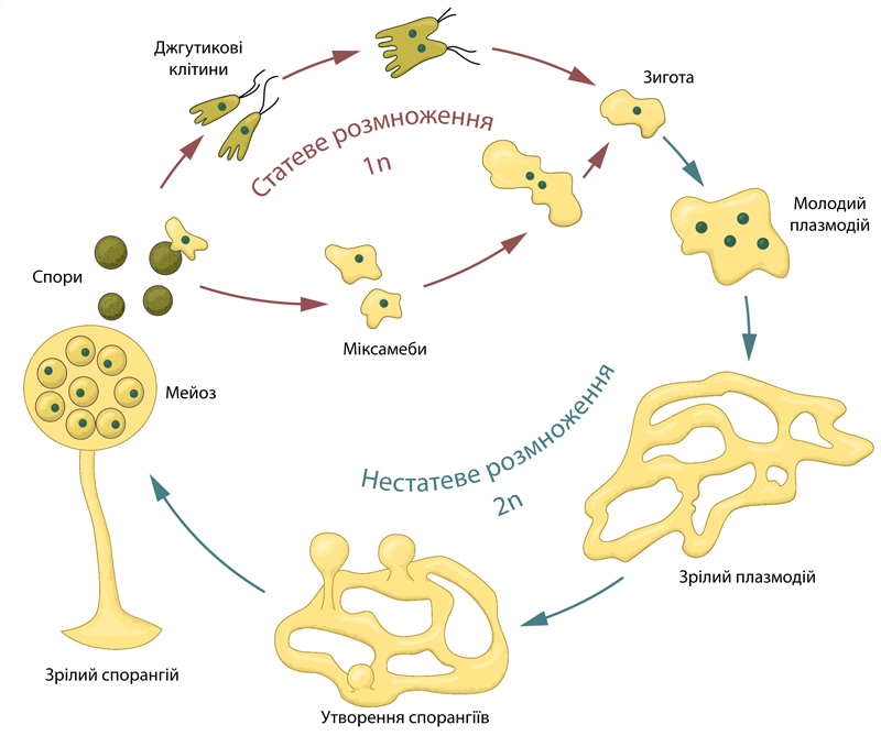 Житттєвий цикл плазмодіального слизовика